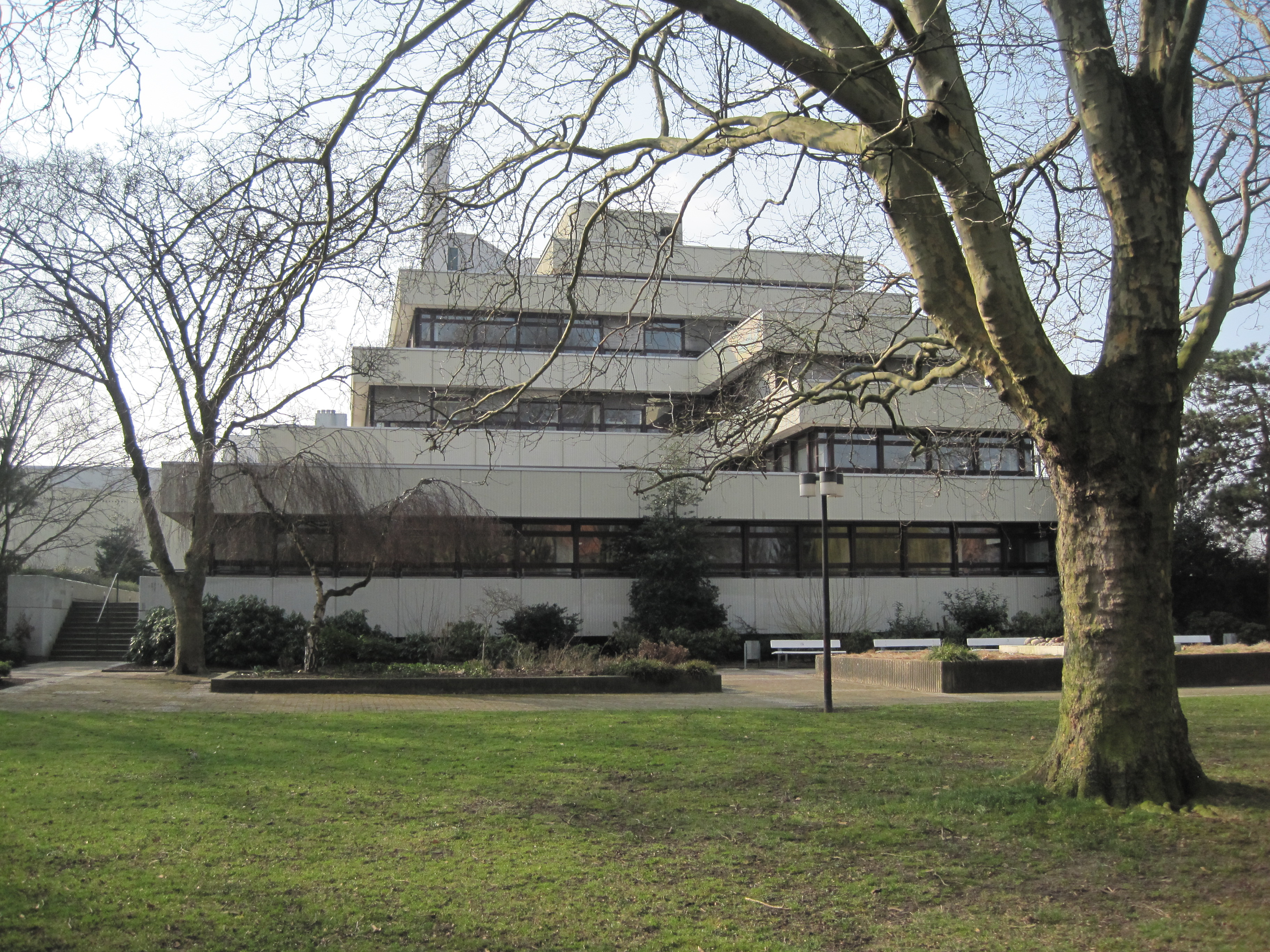 Das Foto zeigt das Rathaus Bockum-Hövel mit Blick vom Stadtpark.